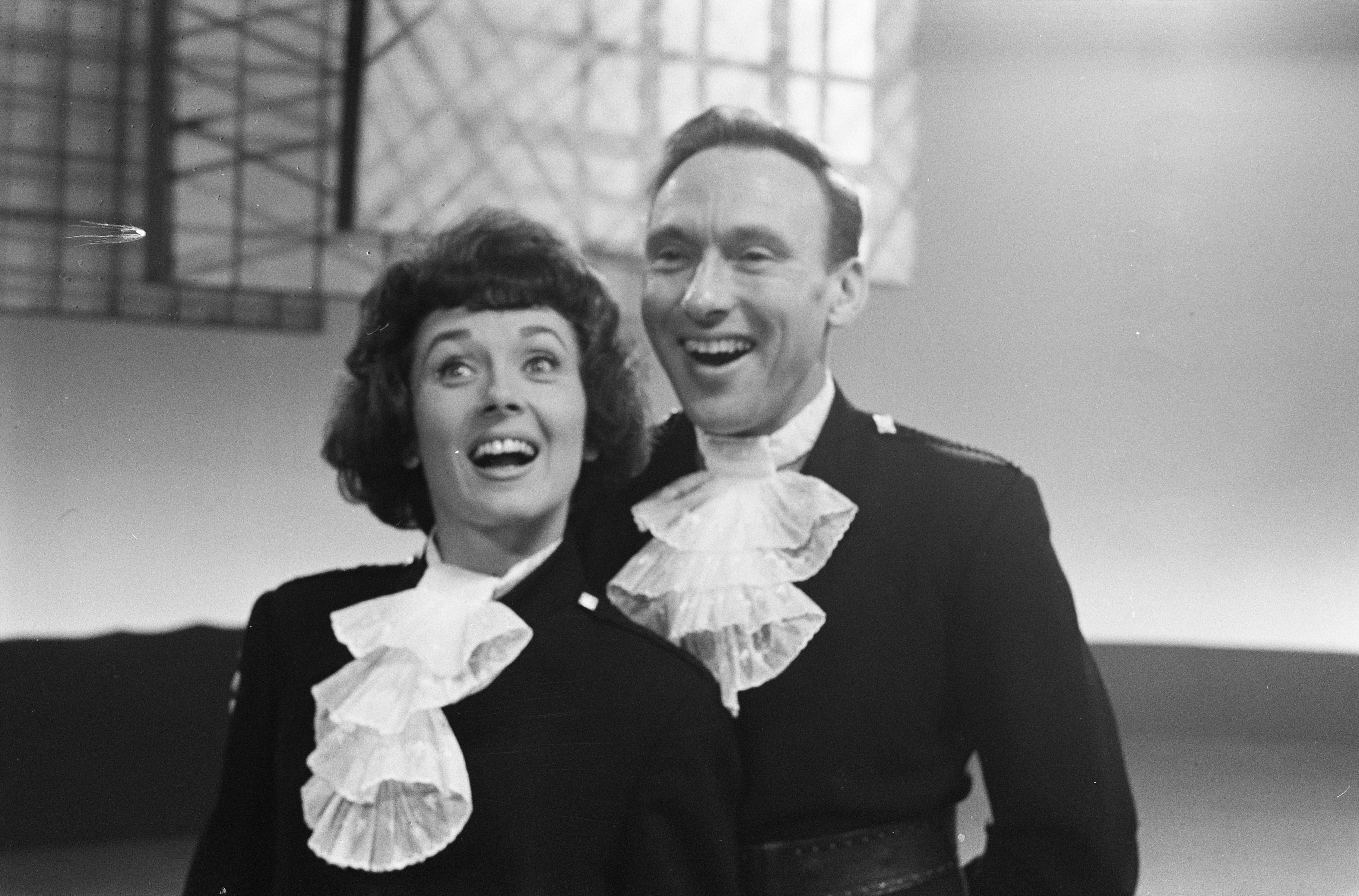 Collectie / Archief : Fotocollectie Anefo Reportage / Serie : [ onbekend ] Beschrijving : TV Music Hall in Treslong, Pearl Carr en Teddy Johnson Datum : 12 december 1962 Trefwoorden : TV-programmas Instellingsnaam : Music Hall, Treslong Fotograaf : Bilsen, Joop van / Anefo Auteursrechthebbende : Nationaal Archief Materiaalsoort : Negatief (zwart/wit) Nummer archiefinventaris : bekijk toegang 2.24.01.05 Bestanddeelnummer : 914-6020